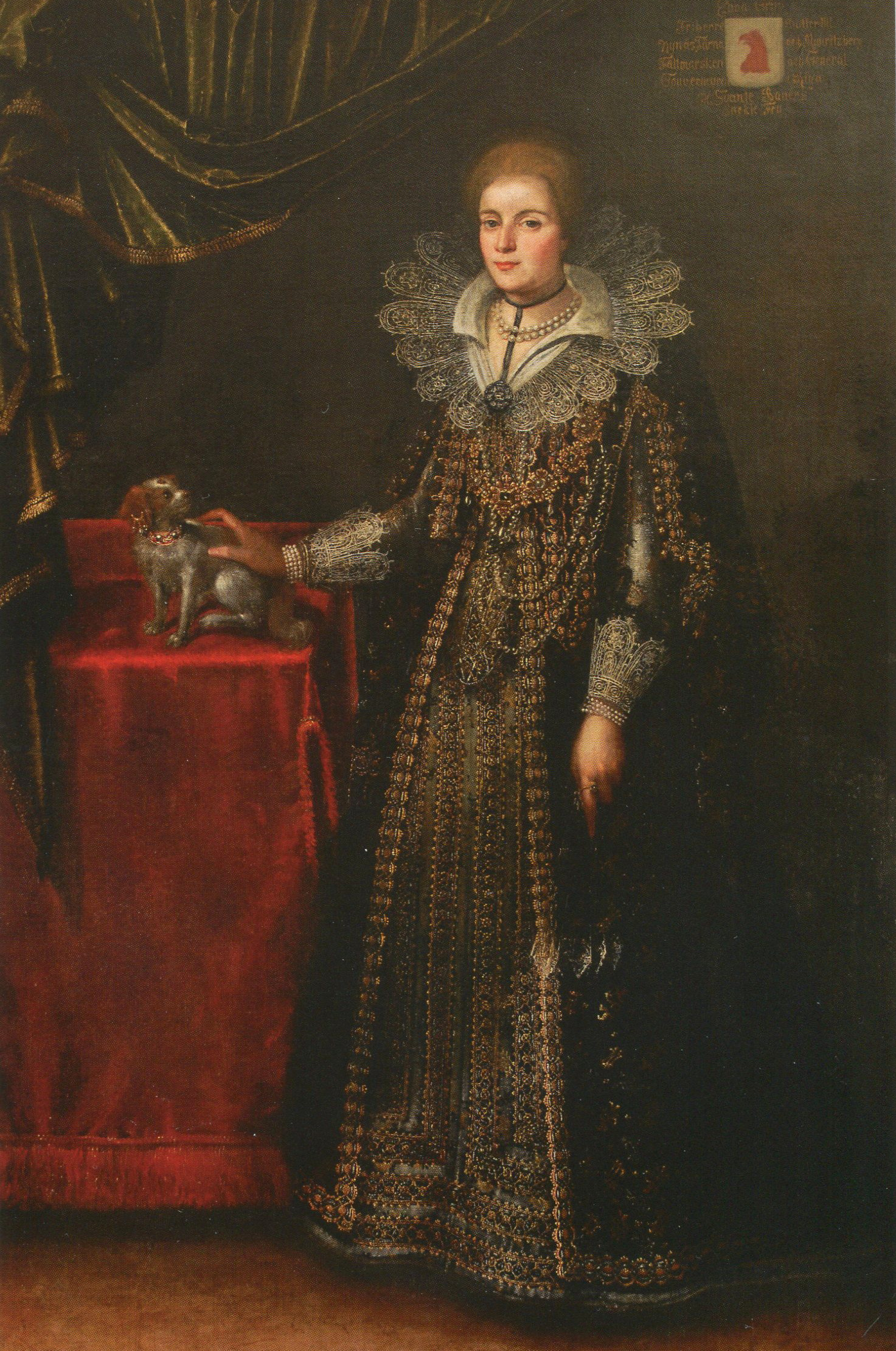 Ebba Grip (1583-1666), Djursholms slott. Målning från omkring 1620.